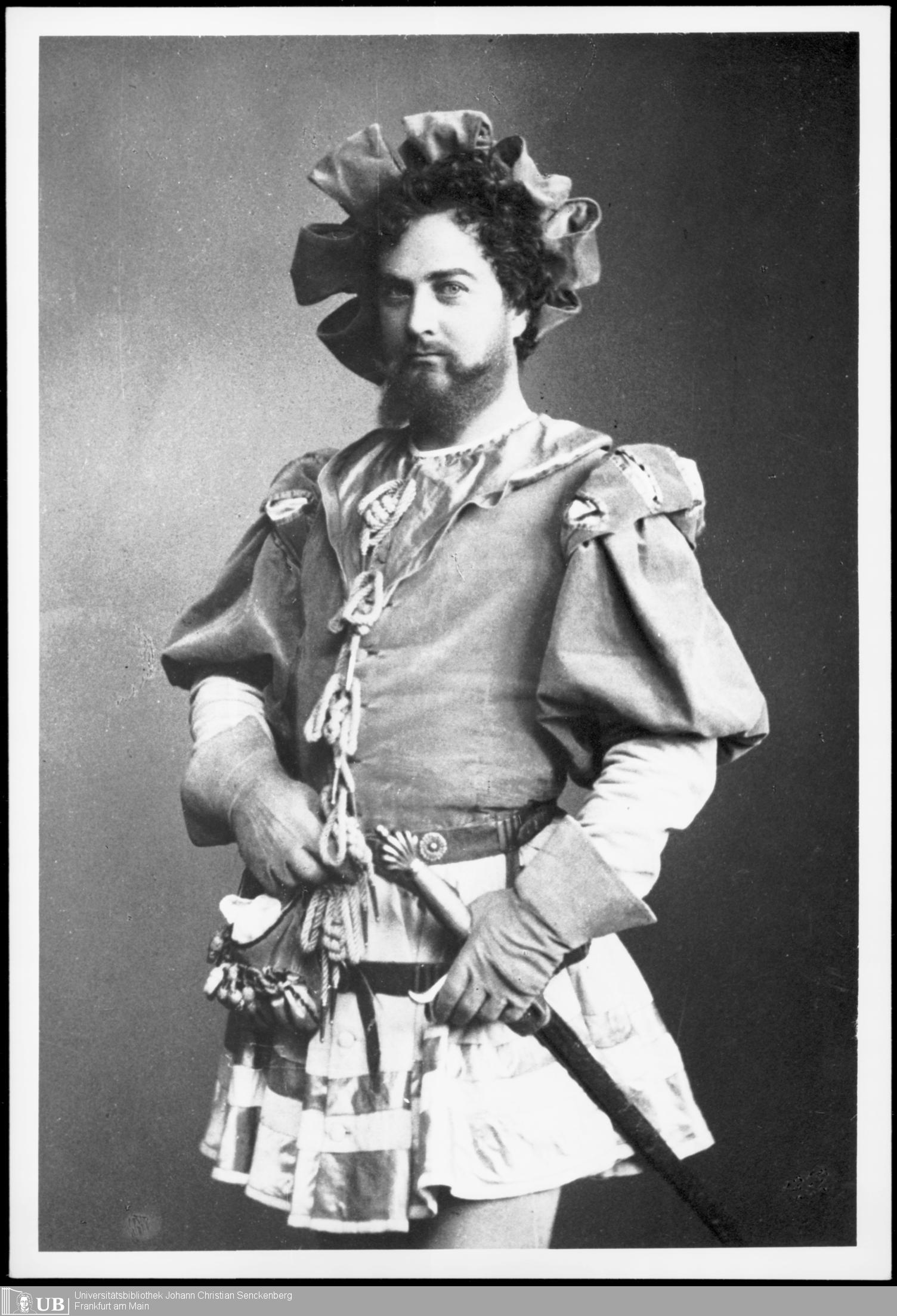 Adalbert Matkowsky als Faust, Rollenbild, Hüftbild. Photographie von J. C. Schaarwächter